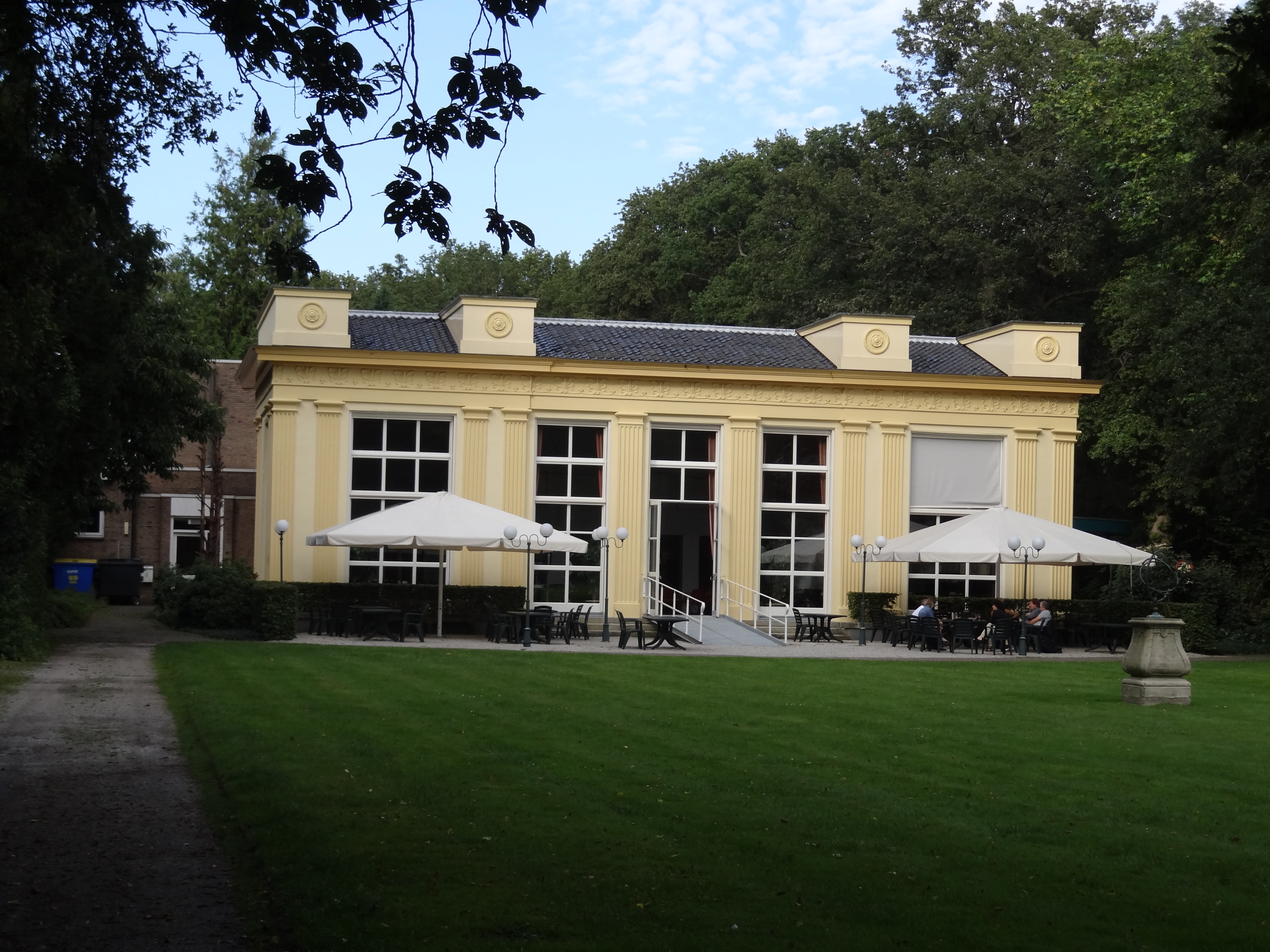 Hartekamp: Oranjerie - Herenweg 5 - Heemstede